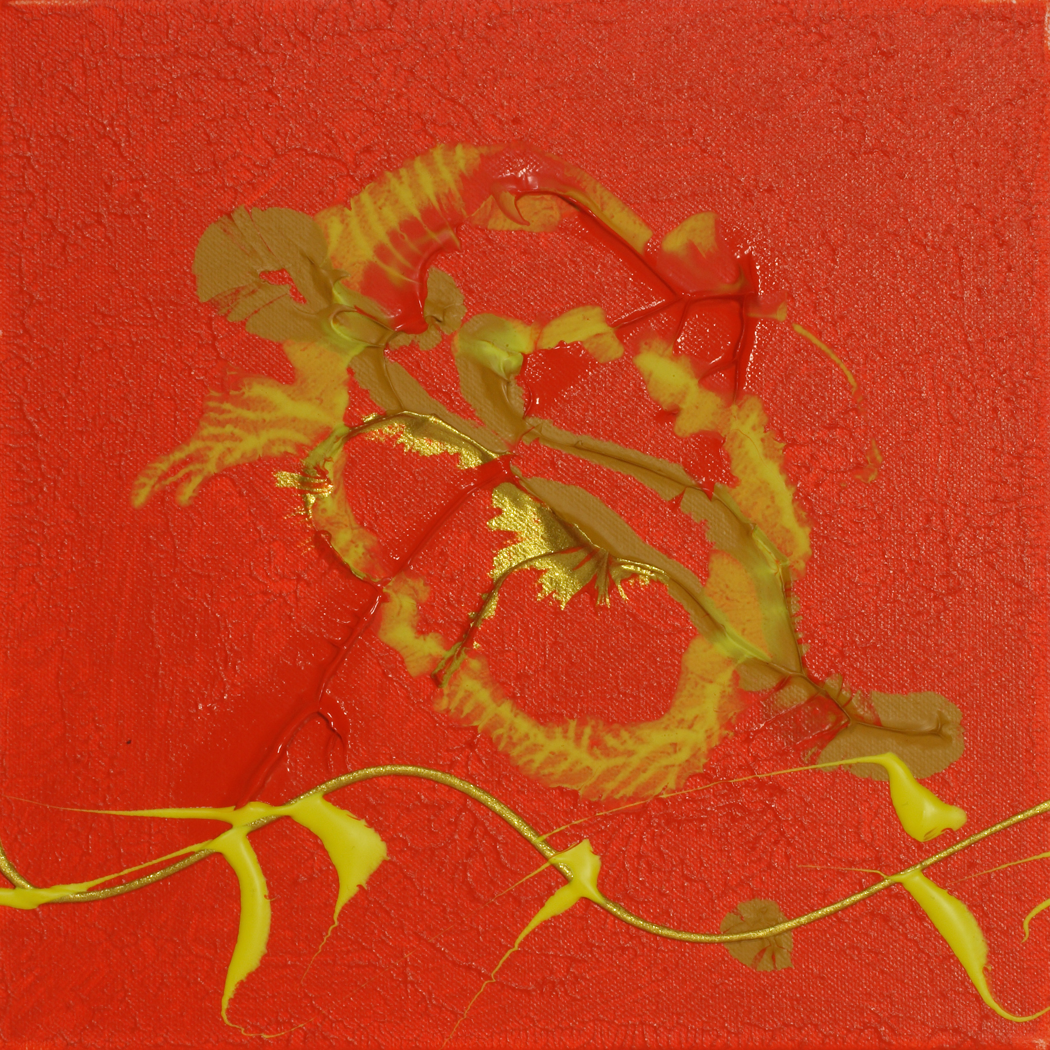 Abstraktes Kunstwerk "UpSideUp"